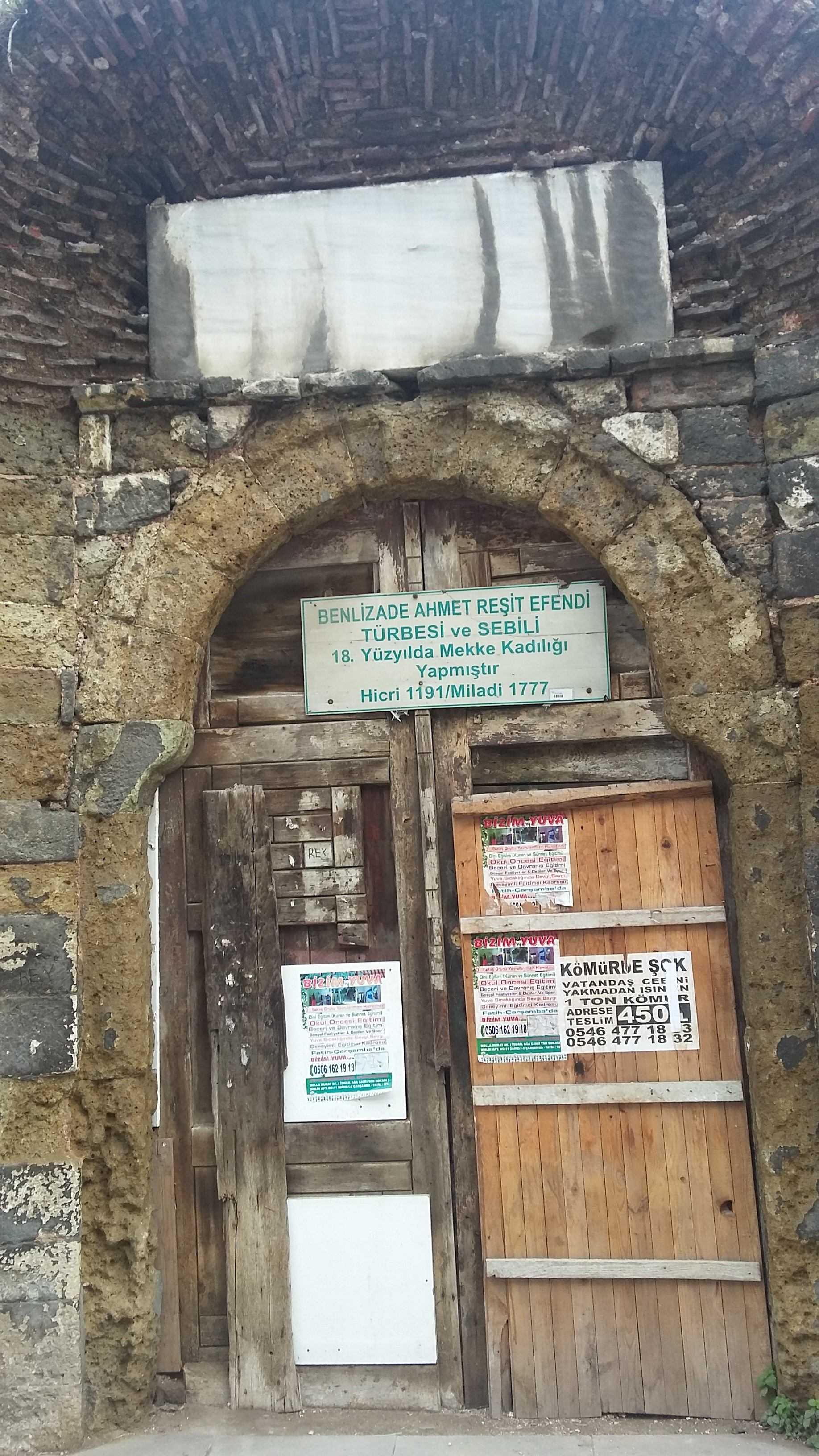 İstanbul Fatih'te, Fatih Camii'ne doğru uzanan Darüşşafaka Caddesi üzerinde bulunan harabe haldeki külliyenin kapısı